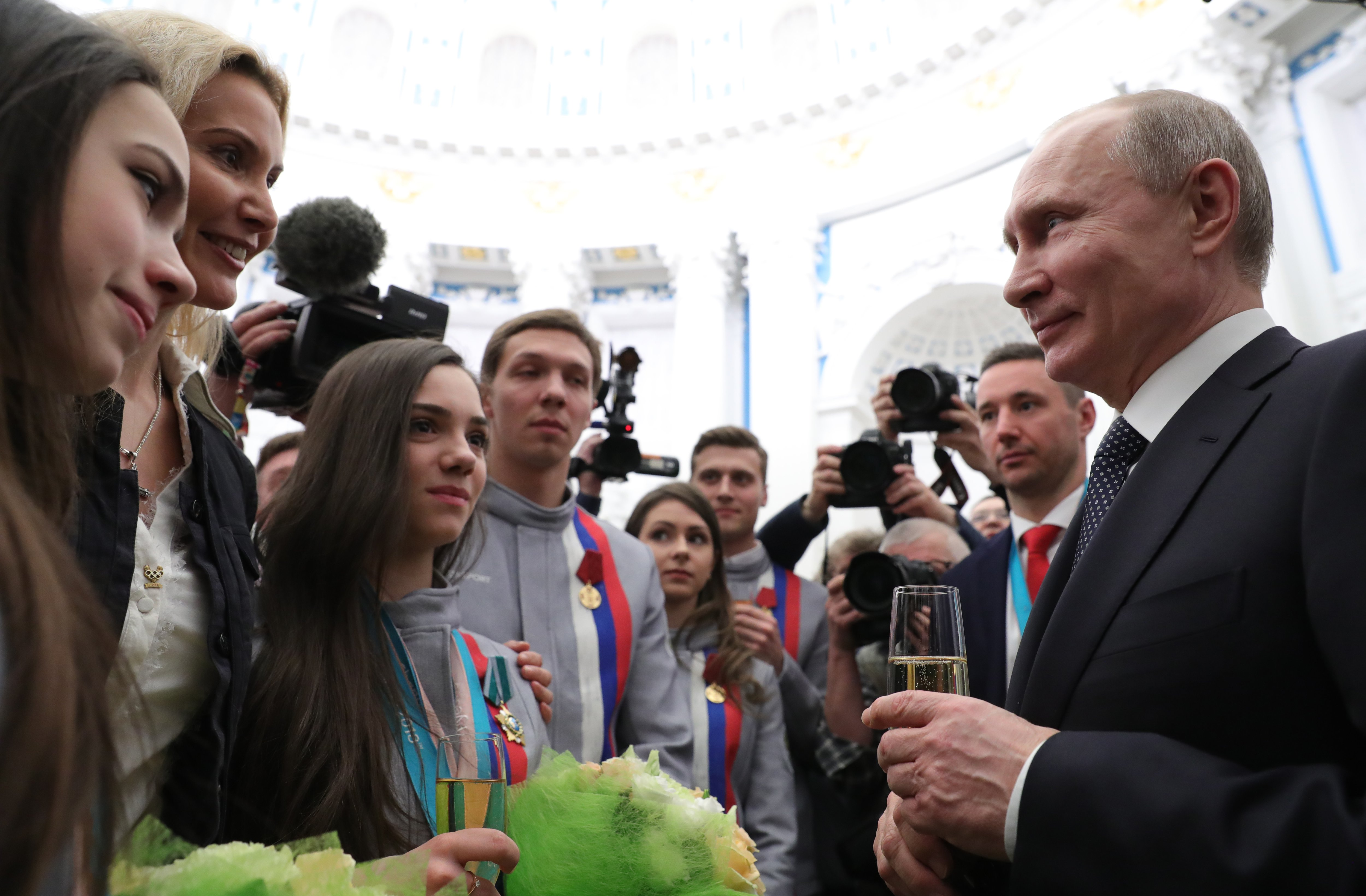 С победителями и призёрами XXIII Олимпийских зимних игр в Пхёнчхане.